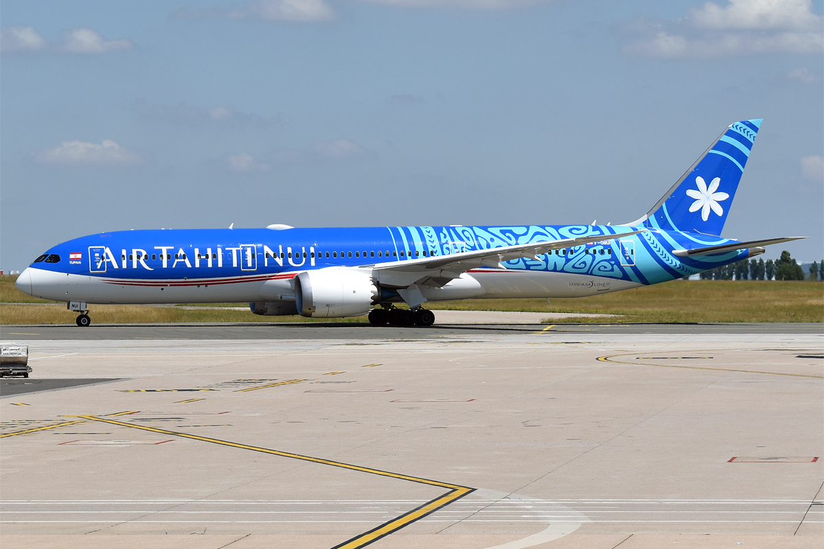 Air Tahiti Nui, F-ONUI, Boeing 787-9 Dreamliner